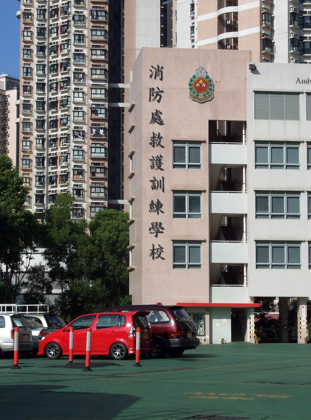 消防處救護訓練學校